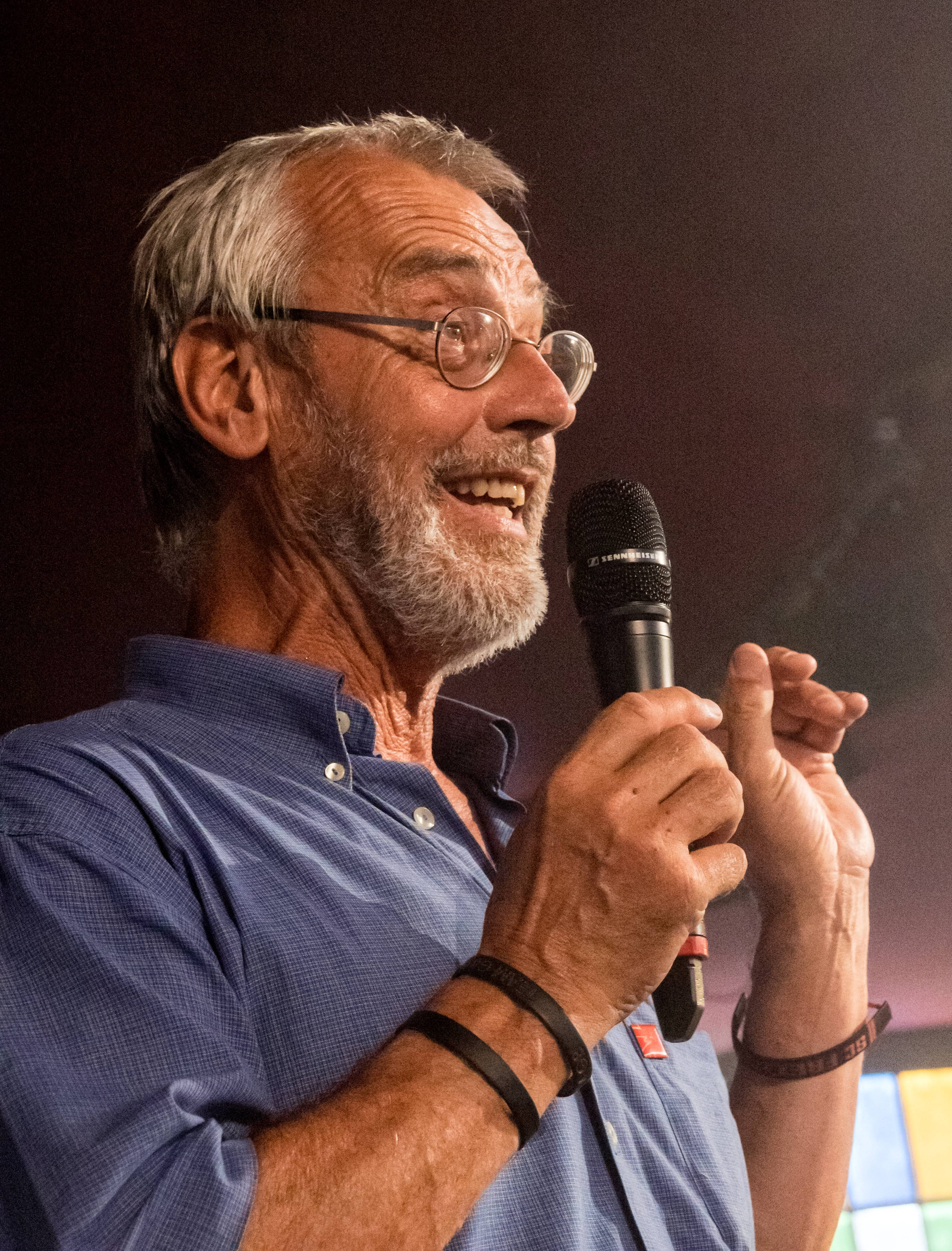 Bilder vom ZMF 2015 Alexander Heisler